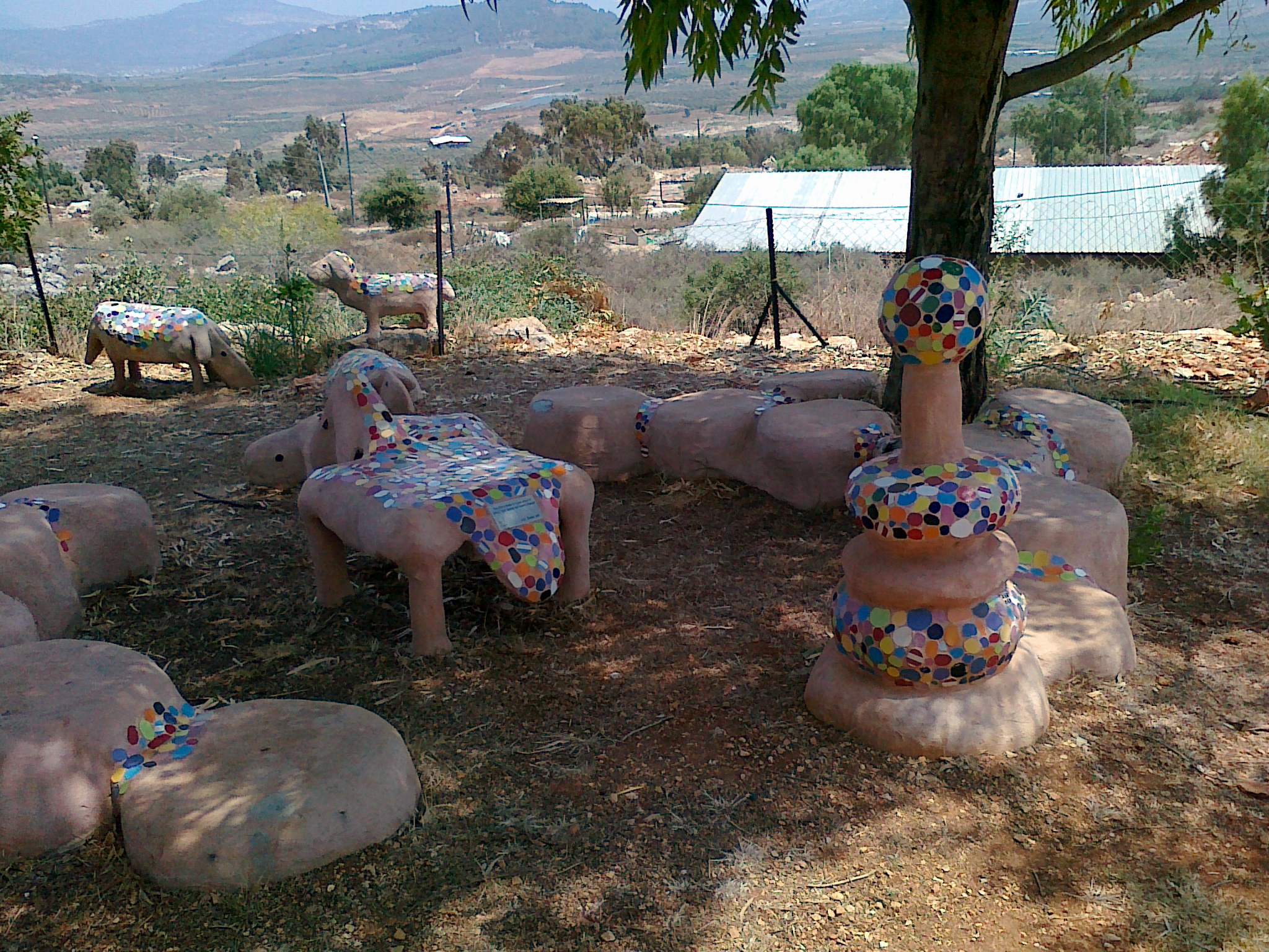 פינת ישיבה אקולוגית הבנויה מציגים ישנים ומלט, בחברת הנוער בקיבוץ-מחנכים אשבל. הפינה הוקמה ע"י החניכים בסיוע "mission posibel"